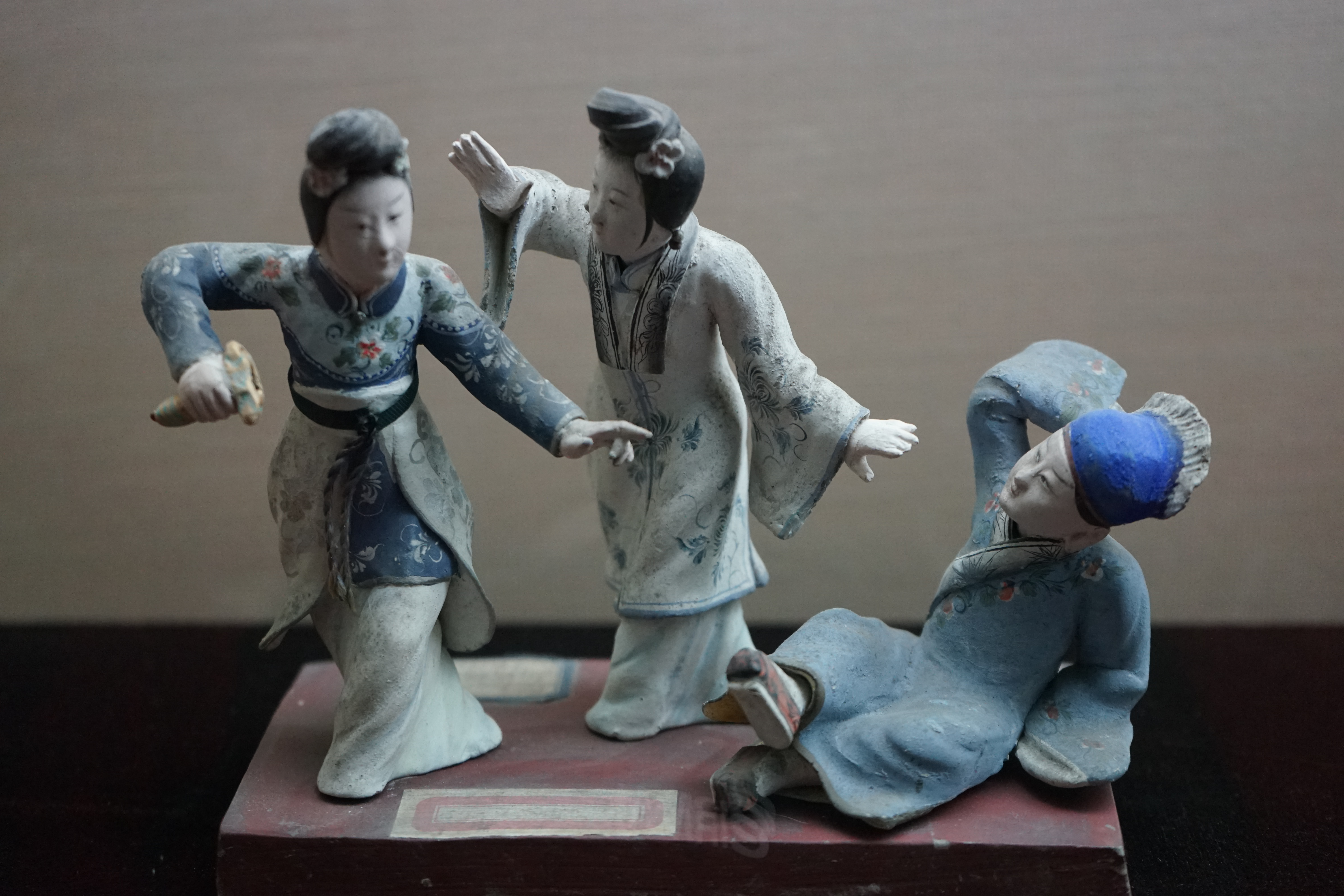 中文（中国大陆）: 《断桥》蒋子贤、陈毓秀 无锡博物院